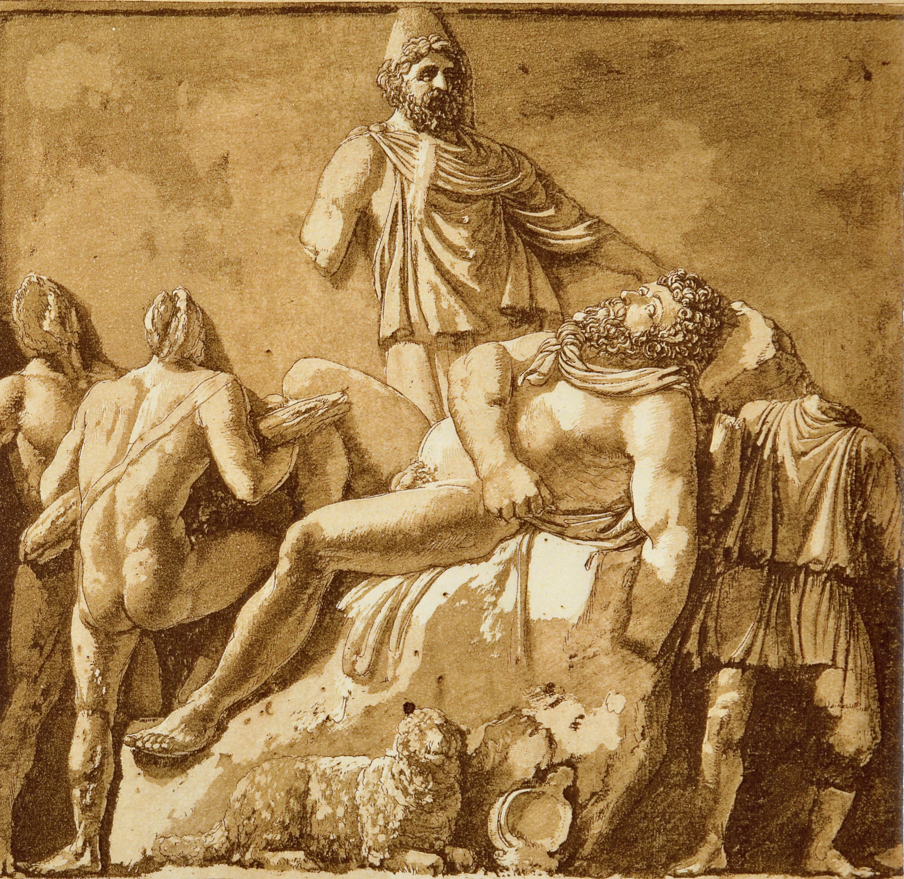 Jean-Pierre Houël (1735–1813): Antikes Relief, das die Sage von Odysseus und Polyphem darzustellen scheint. Ätzradierung nach Original im Museum des Benediktinerklosters San Nicolò l’Arena in Catania, heute "restauriert" im dortigen Museo Civico Castello Ursino. Aus: Voyage pittoresque des isles de Sicile, de Malte et de Lipari (…), 2. Band, Imprimerie de Monsieur, Paris 1784, S. 134 f., Tafel 137 rechts.